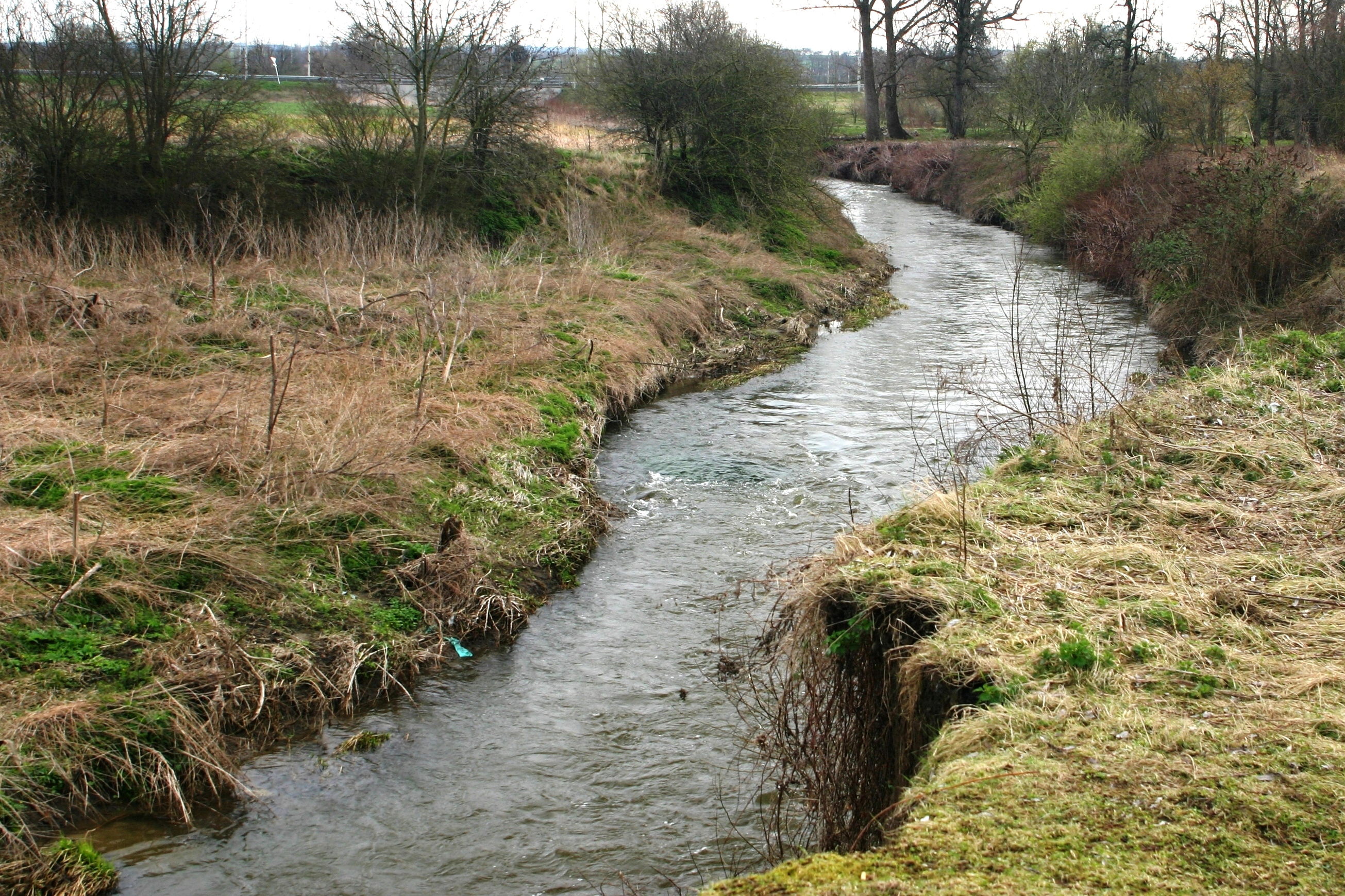 D'Berwinne beim Barrage vu Lixhe no uewe gekuckt